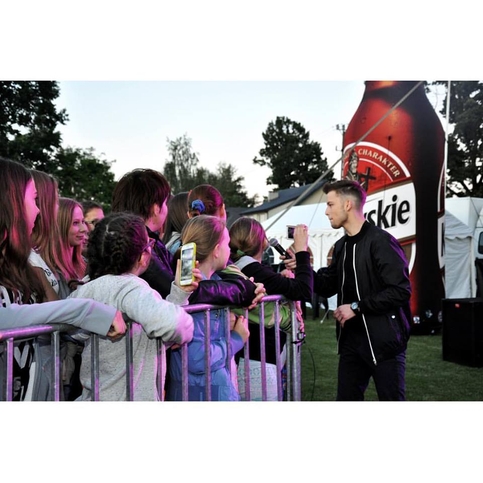 Hubert Jabłoński koncert 2017